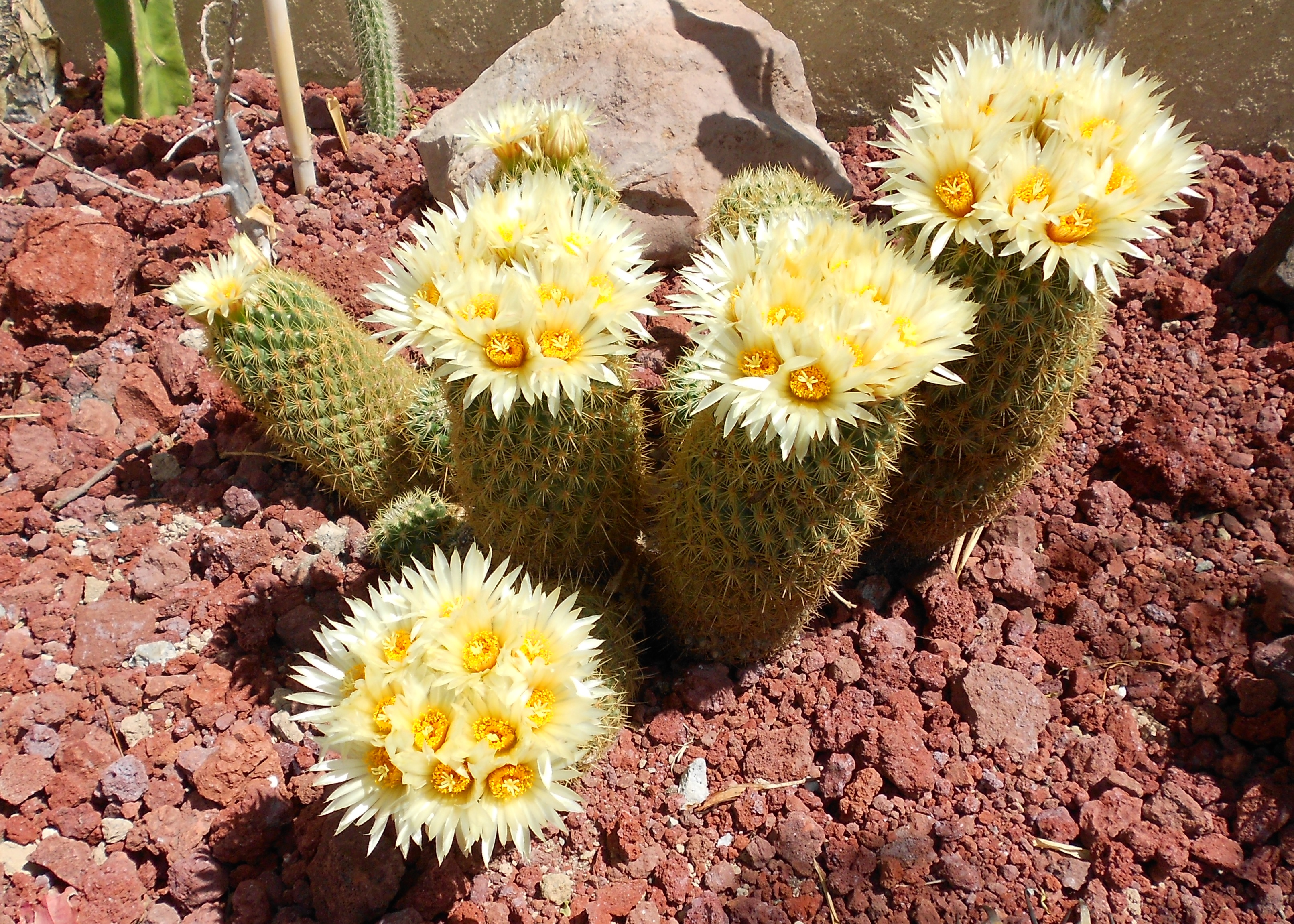 Coryphantha erecta Floreando